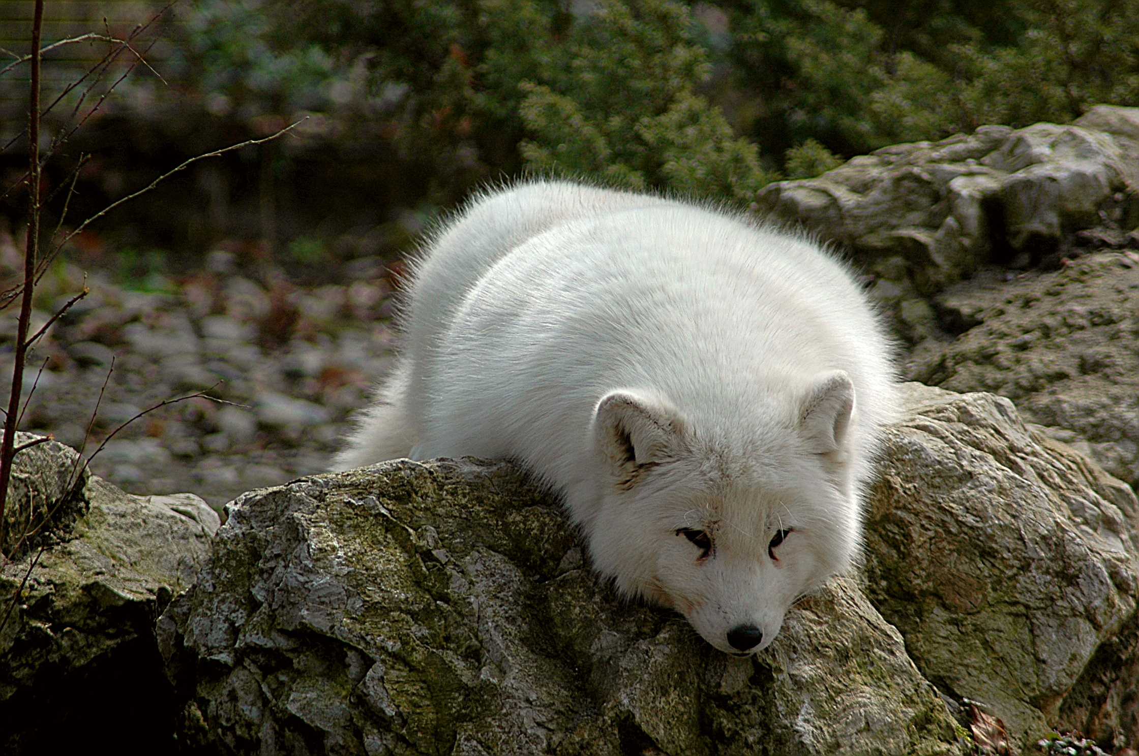 Polarfuchs / Eisfuchs (Alopex lagopus)